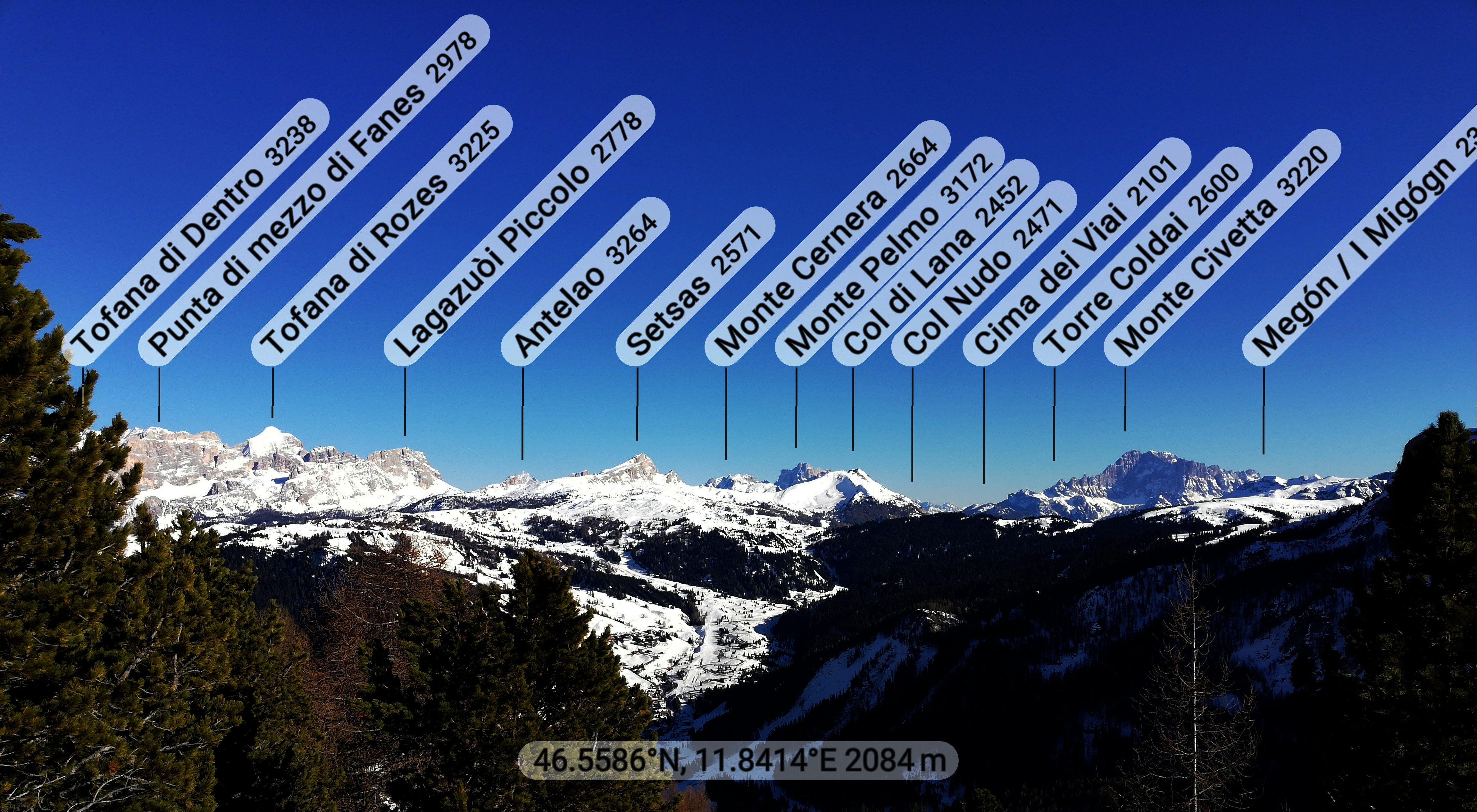 Panoramabild mit Beschriftung einiger wichtiger 3000er Berge der südlichen Dolomiten: Tofana die Dentro, Tofana di Rozes, Antelao, Monte Pelmo, Monte Civetta.